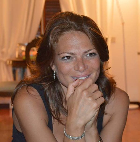 Valeria Ciardiello, Roma